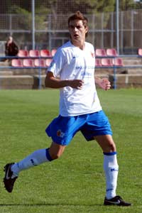 Raúl Goni durante uno de los entrenamientos del Real Zaragoza.